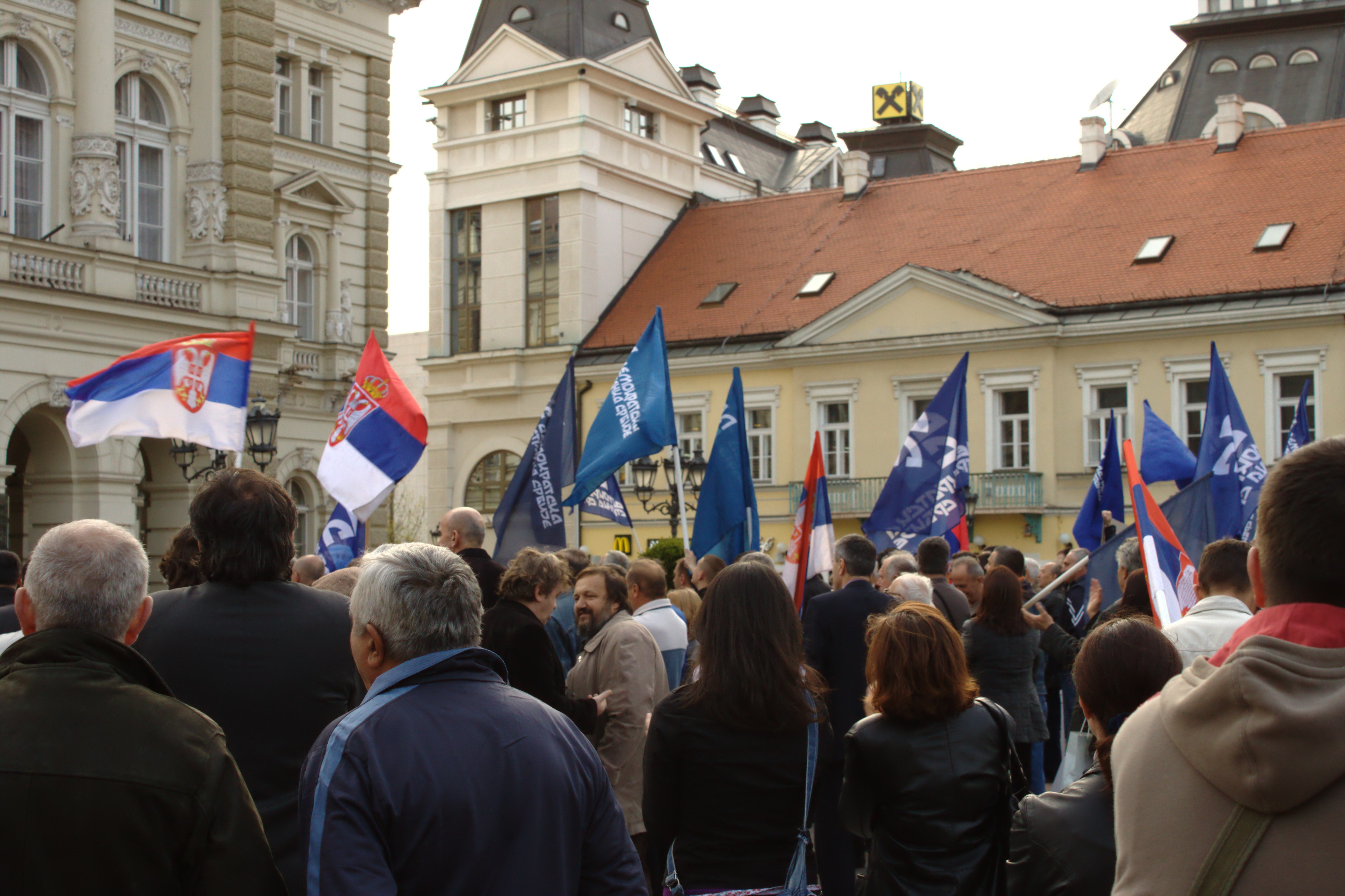 Protesti na Trgu slobode u Novom Sadu